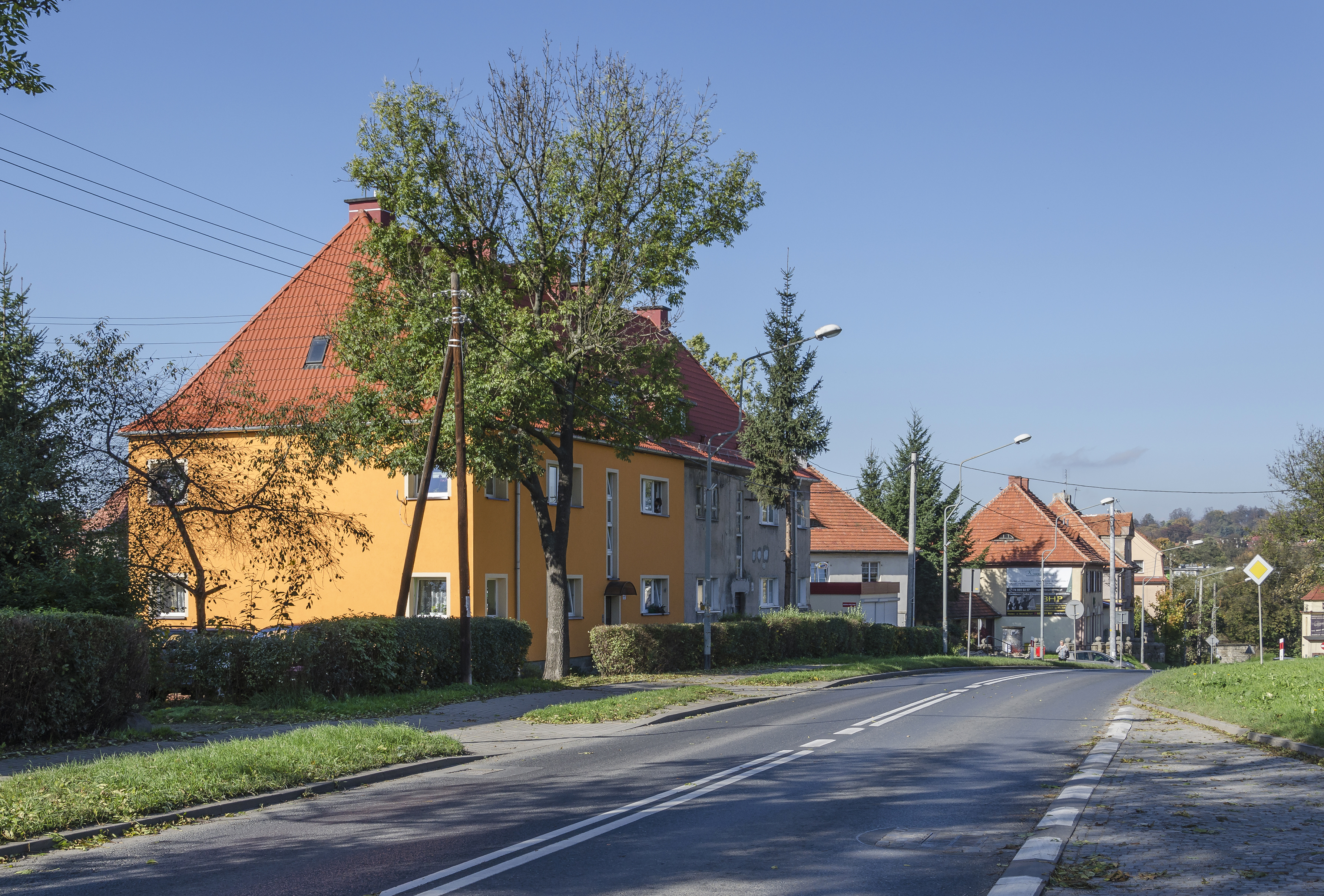 Kłodzko, ul. Wyspiańskiego